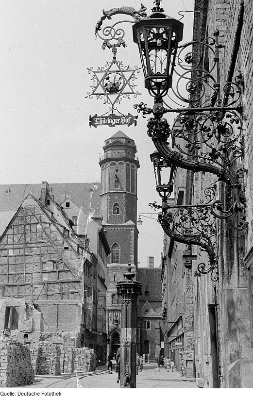 Original image description from the Deutsche Fotothek Burgstraße mit Blick auf Thomaskirche